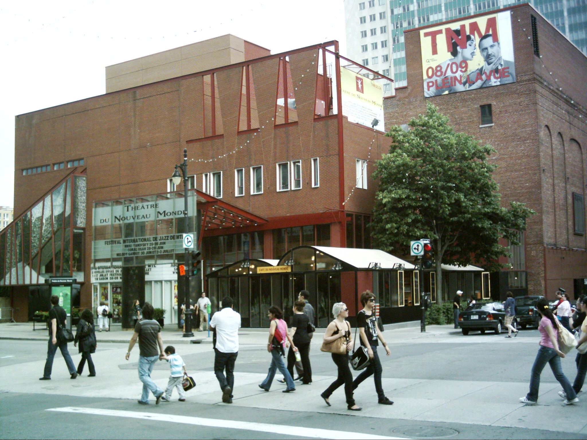 Le Théâtre du Nouveau Monde est situé au 84 rue Sainte-Catherine ouest à Montréal.